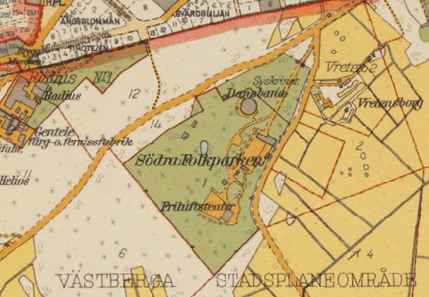 Del av 1934 års karta över Stockholm med omgivningar visande Södra Folkparken